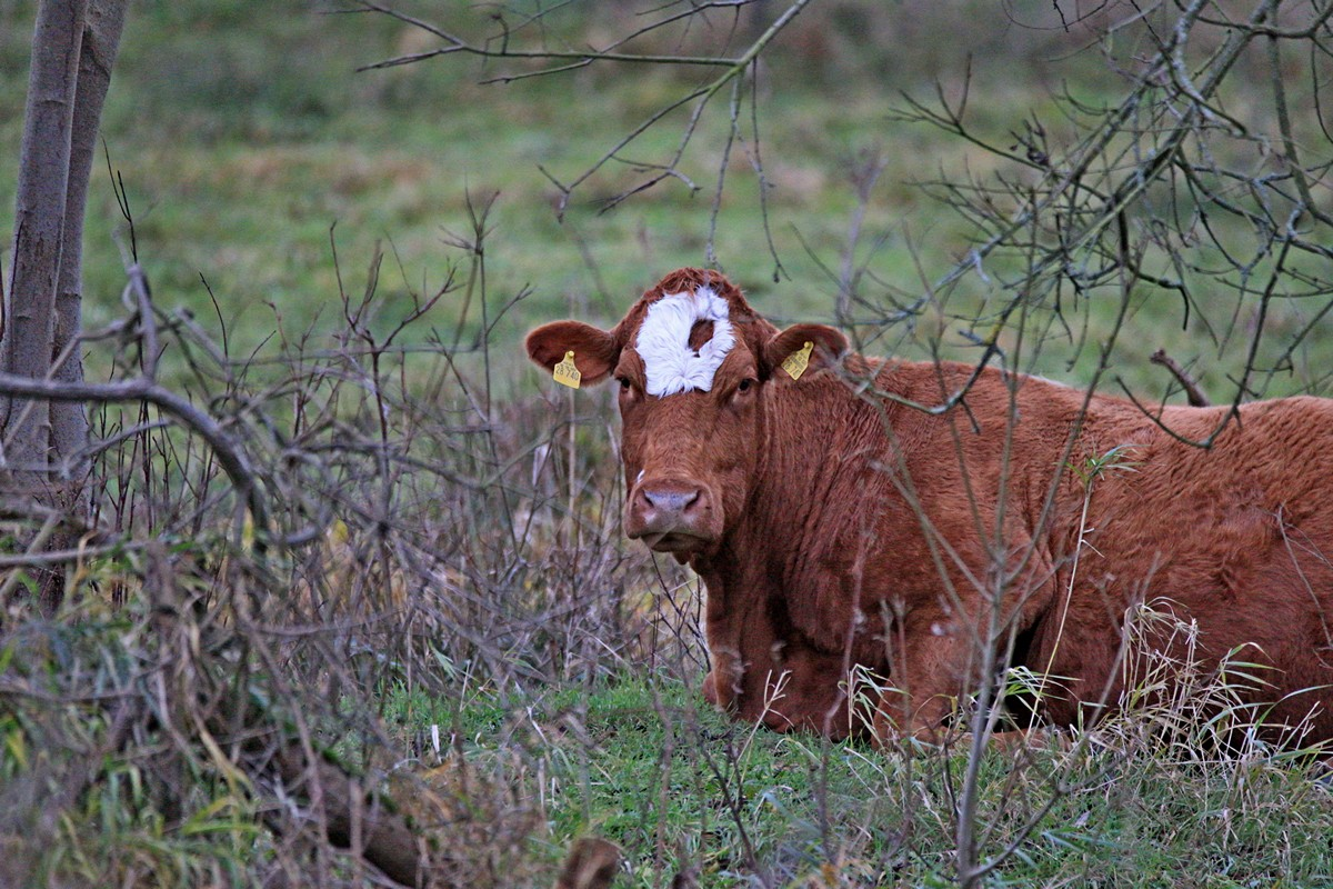 Liegende Mastkuh bei Vietzen im Niedermoor an der B 198 in Mecklenburg